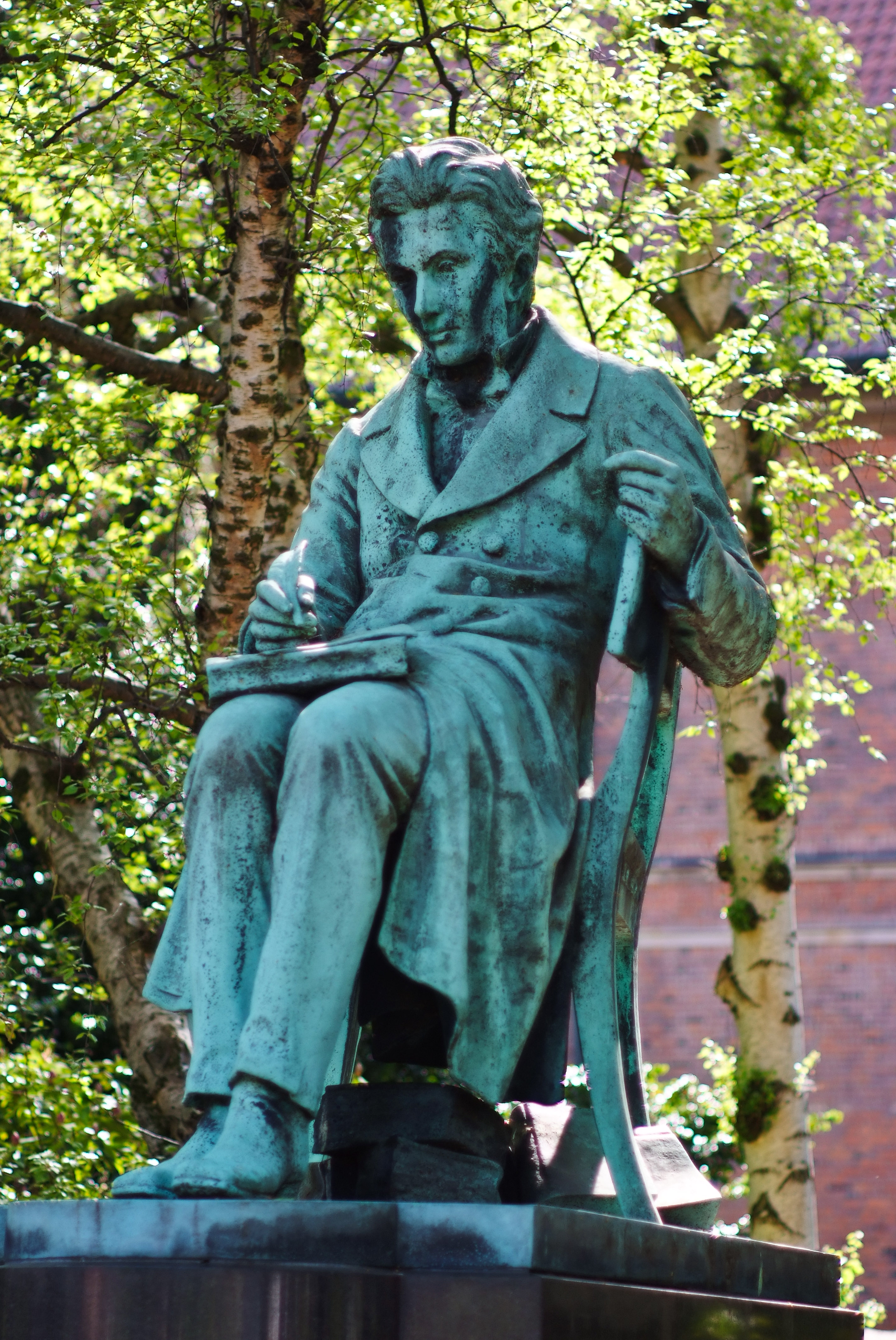 Søren Kierkegaard, Danish philosopher